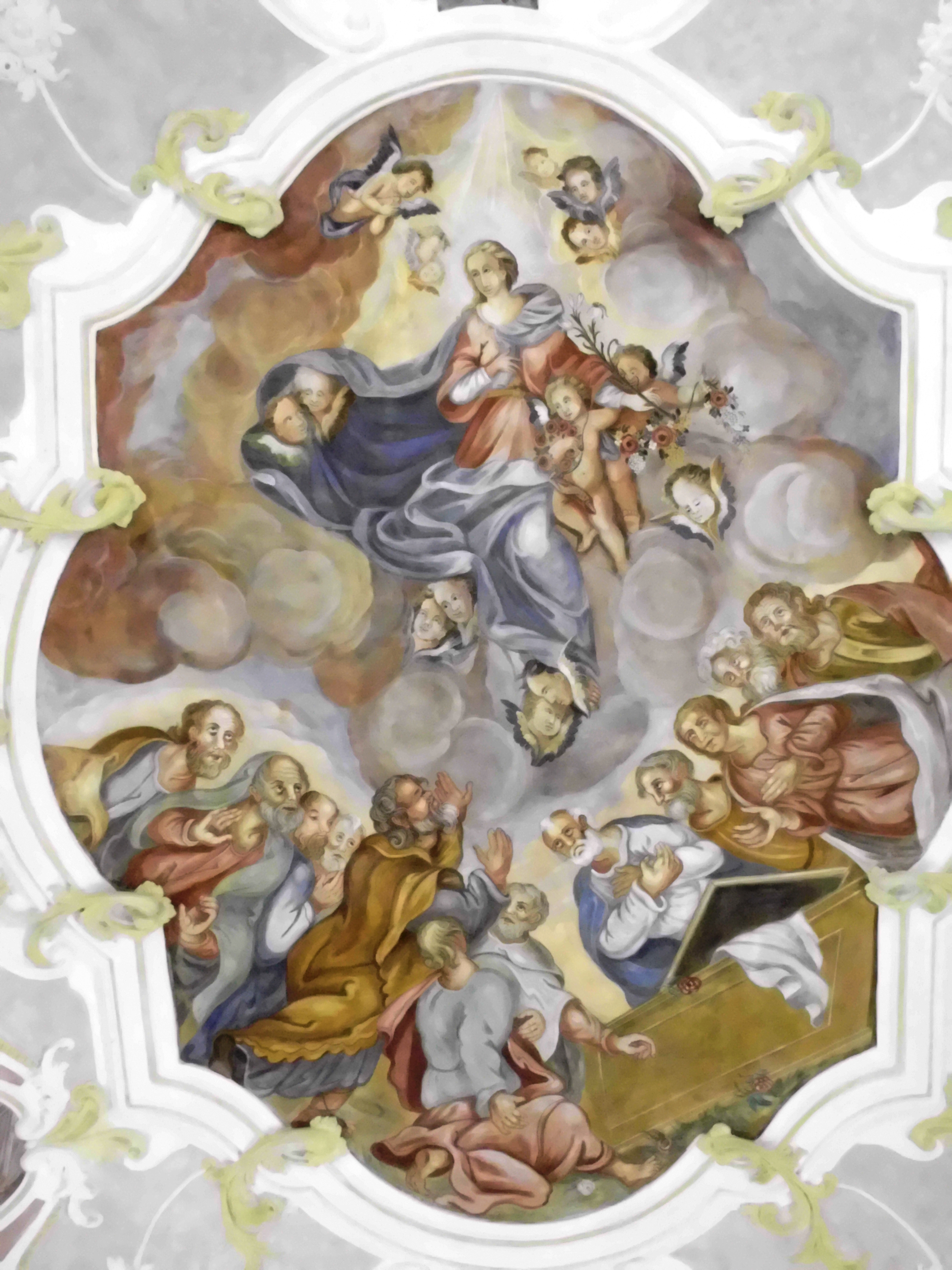 Bergheim im Landkreis Neuburg-Schrobenhausen, Marienkapelle, Fresko "Mariä Himmelfahrt"